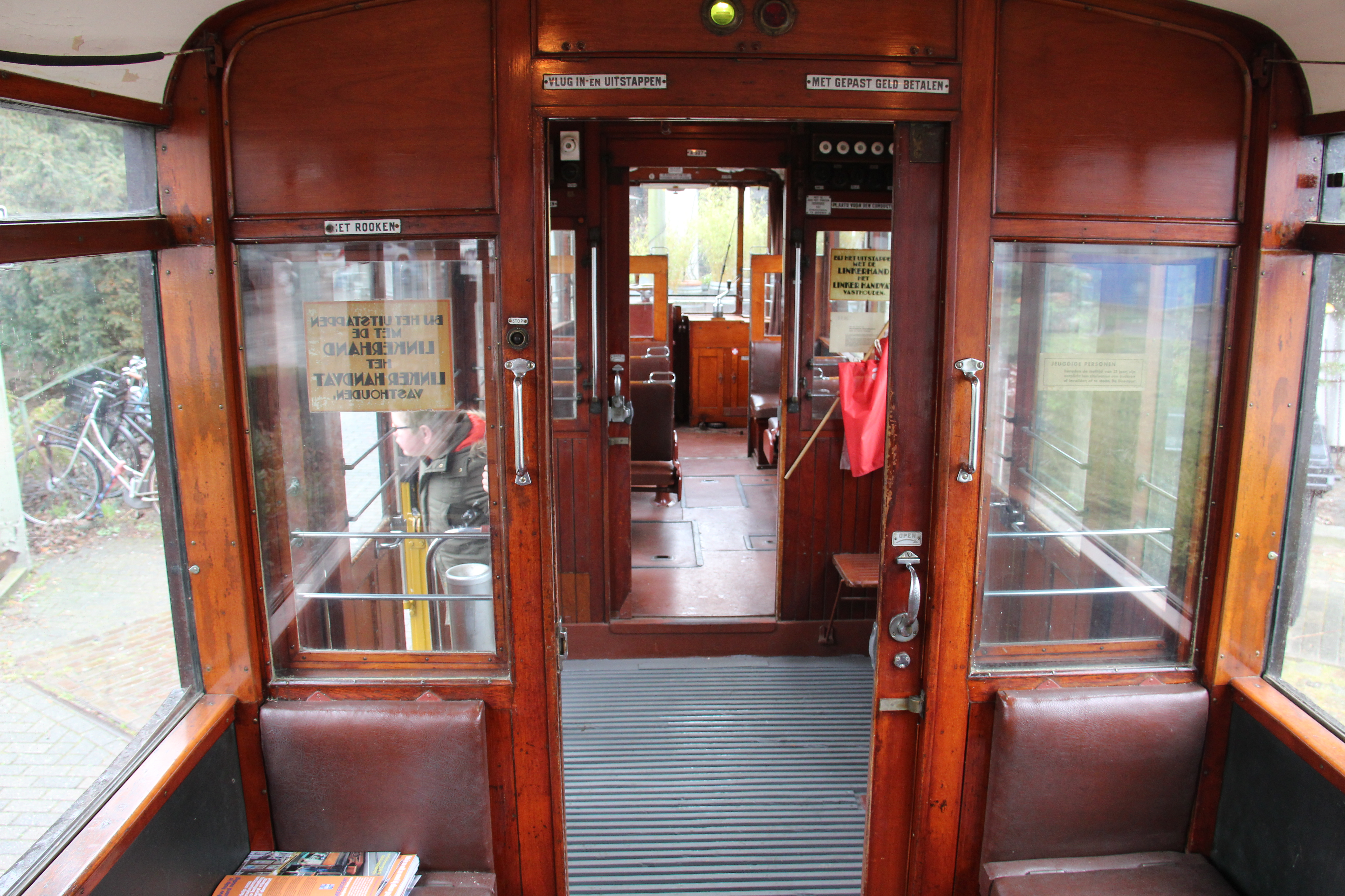 Interieur van RET 507, een Rotterdamse vierasser, bij de Elektrische Museumtramlijn in Amsterdam in 2018.